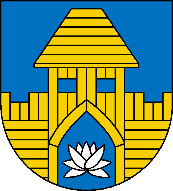 Herb gminy Ełk